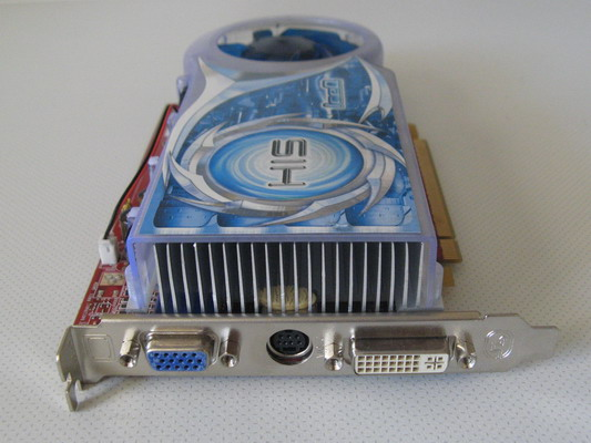 HIS ATI Radeon X1600 Pro IceQ, Seitenansicht mit Anschlüssen und Lüftungsausgang